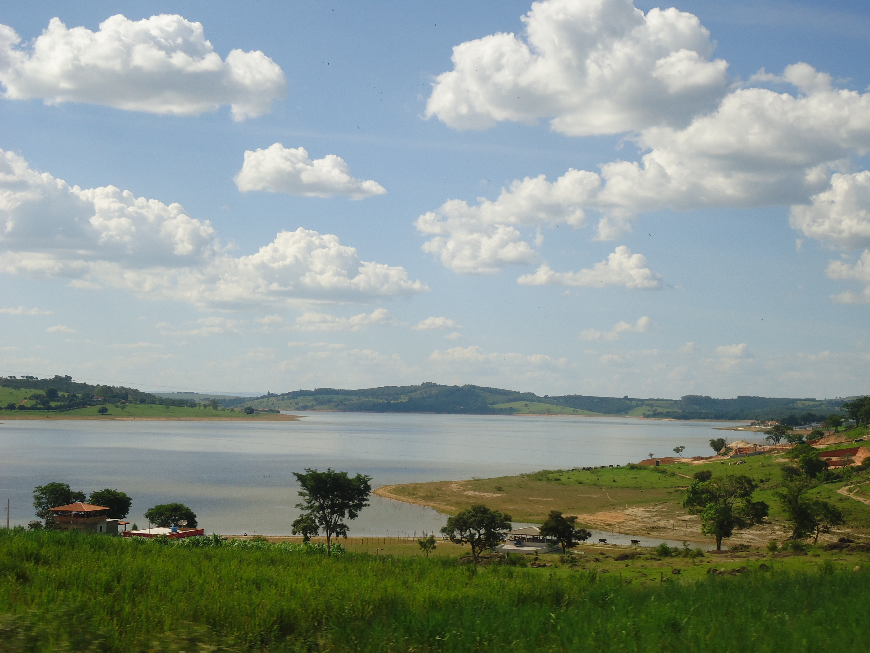 Vista da represa em Aguanil, a partir da BR-369